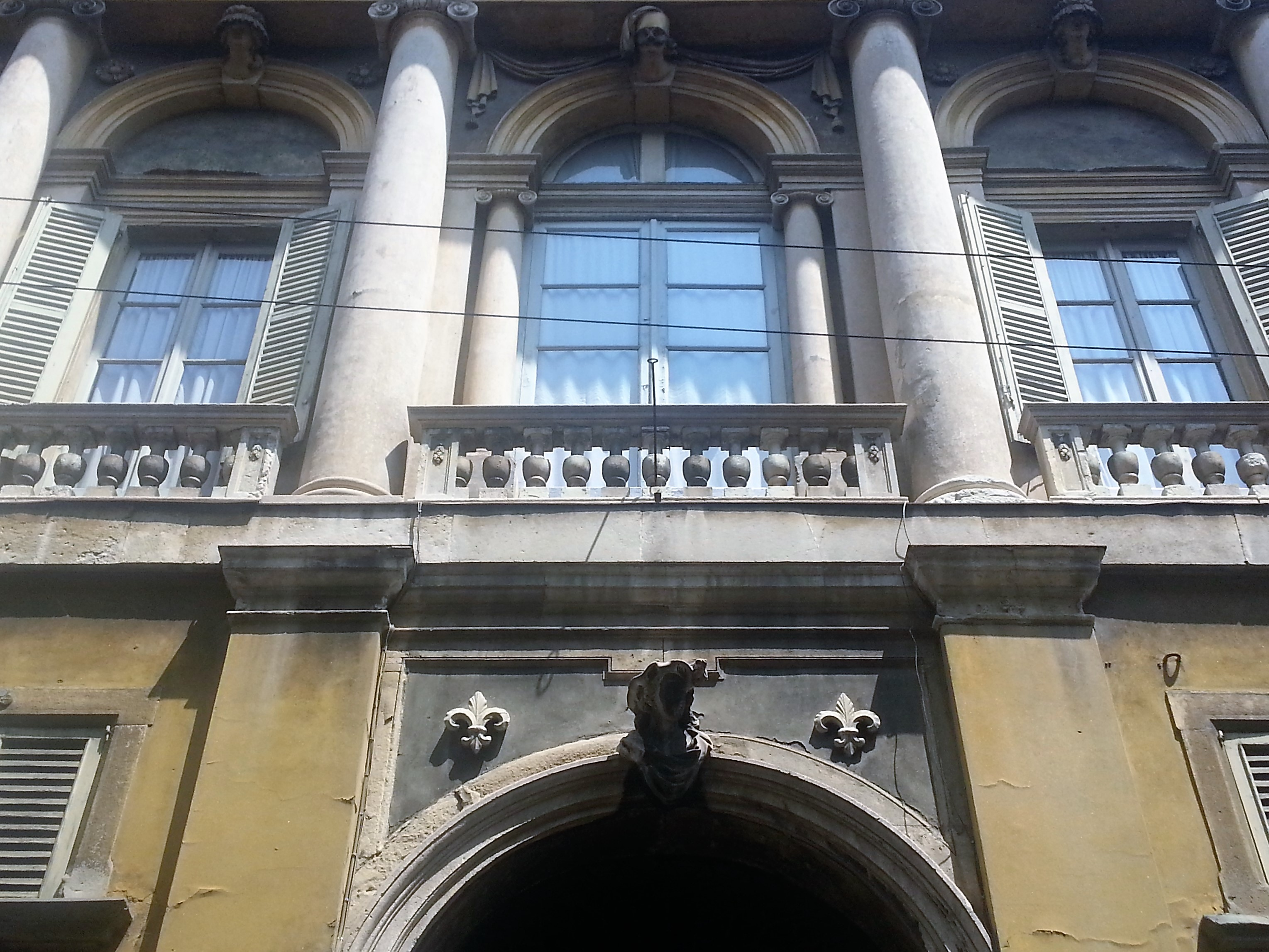 Facciata Palazzo Bonomi - Bergamo